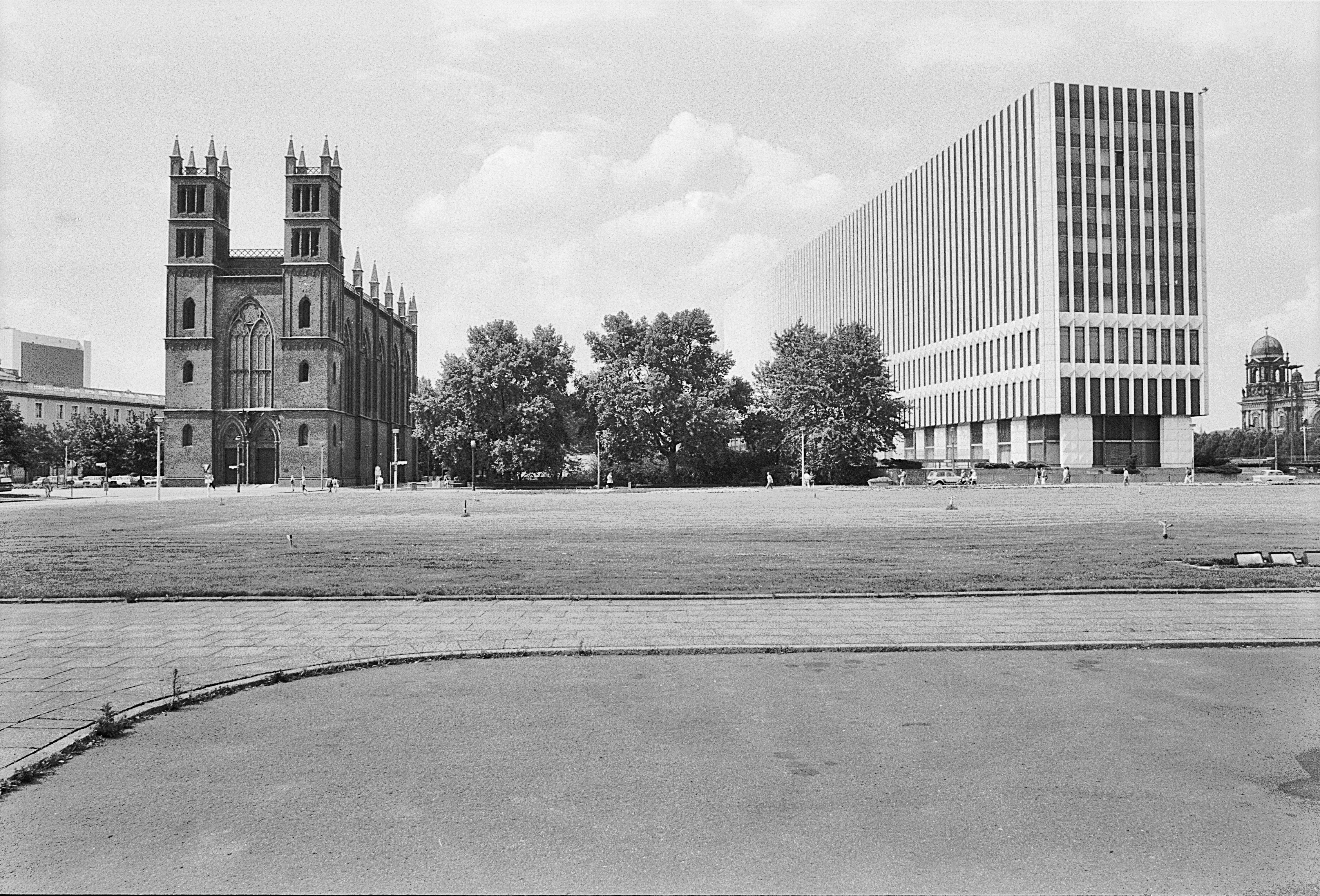 Friedrichswerdersche-Kirche, Französische Straße und Außenministerium, weitere Bilder auf : ddr-fotograf.de